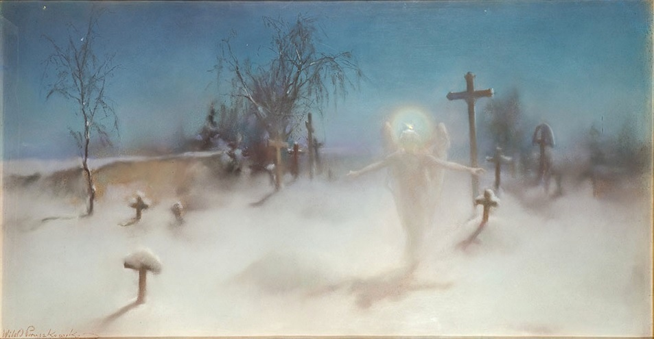 Eloe